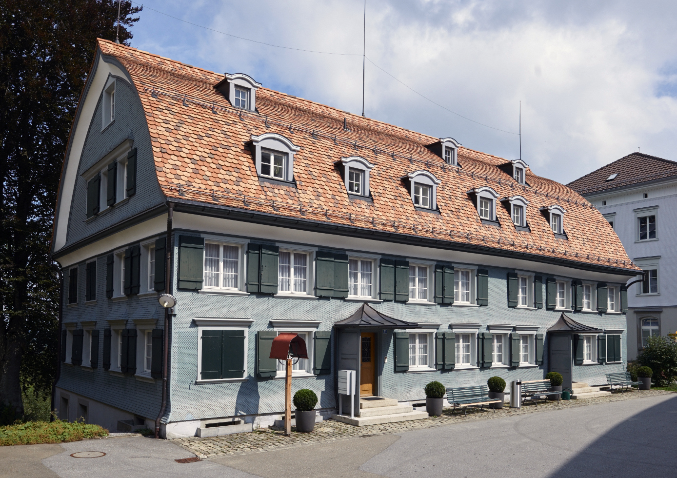 Altes Konvikt, Kantonsschule Trogen